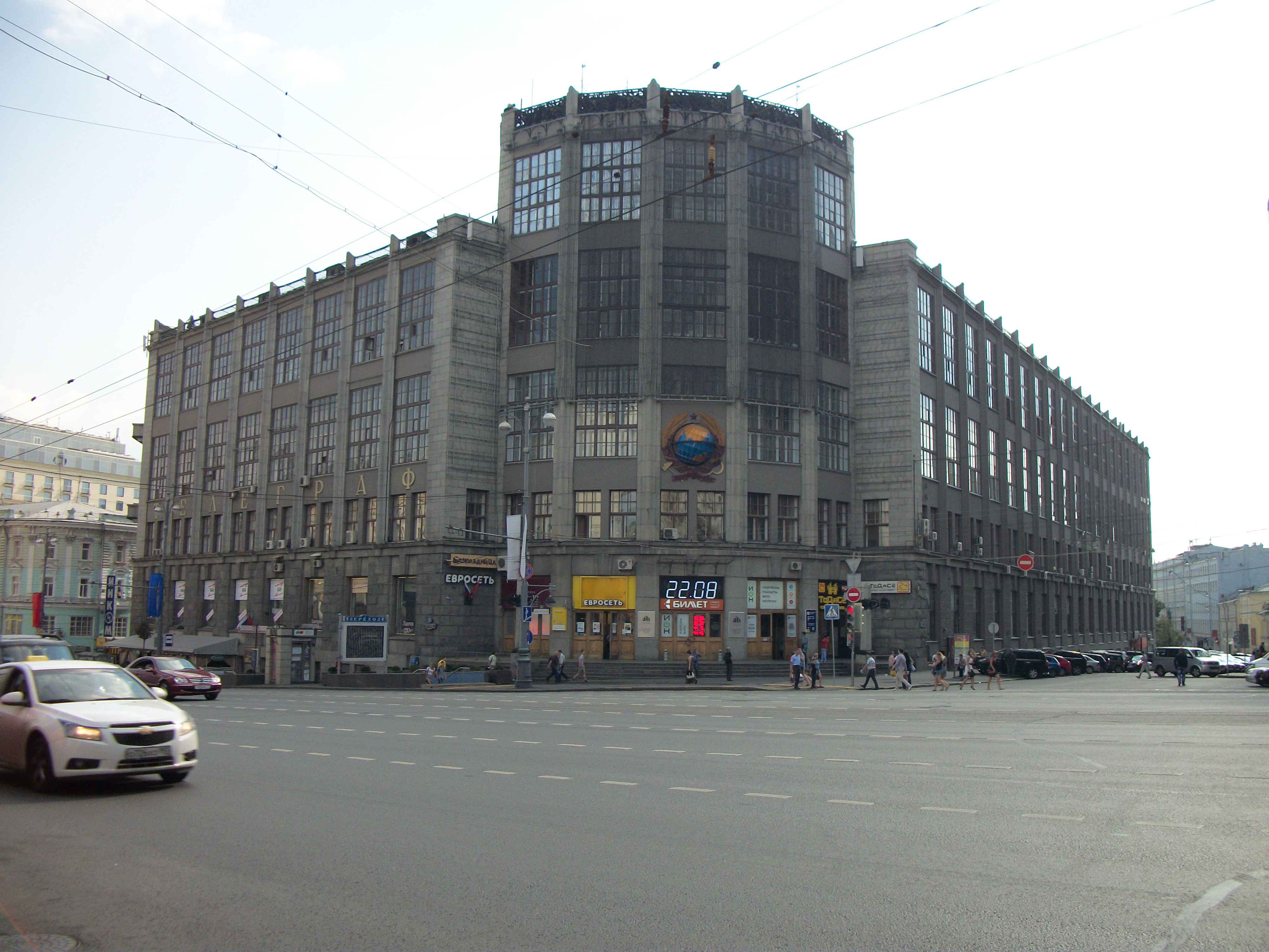 Здание центрального телеграфа (Москва и Московская область, Москва, Тверская улица, 7)